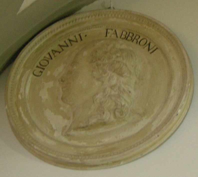 Specola, medaglione di giovanni fabbroni